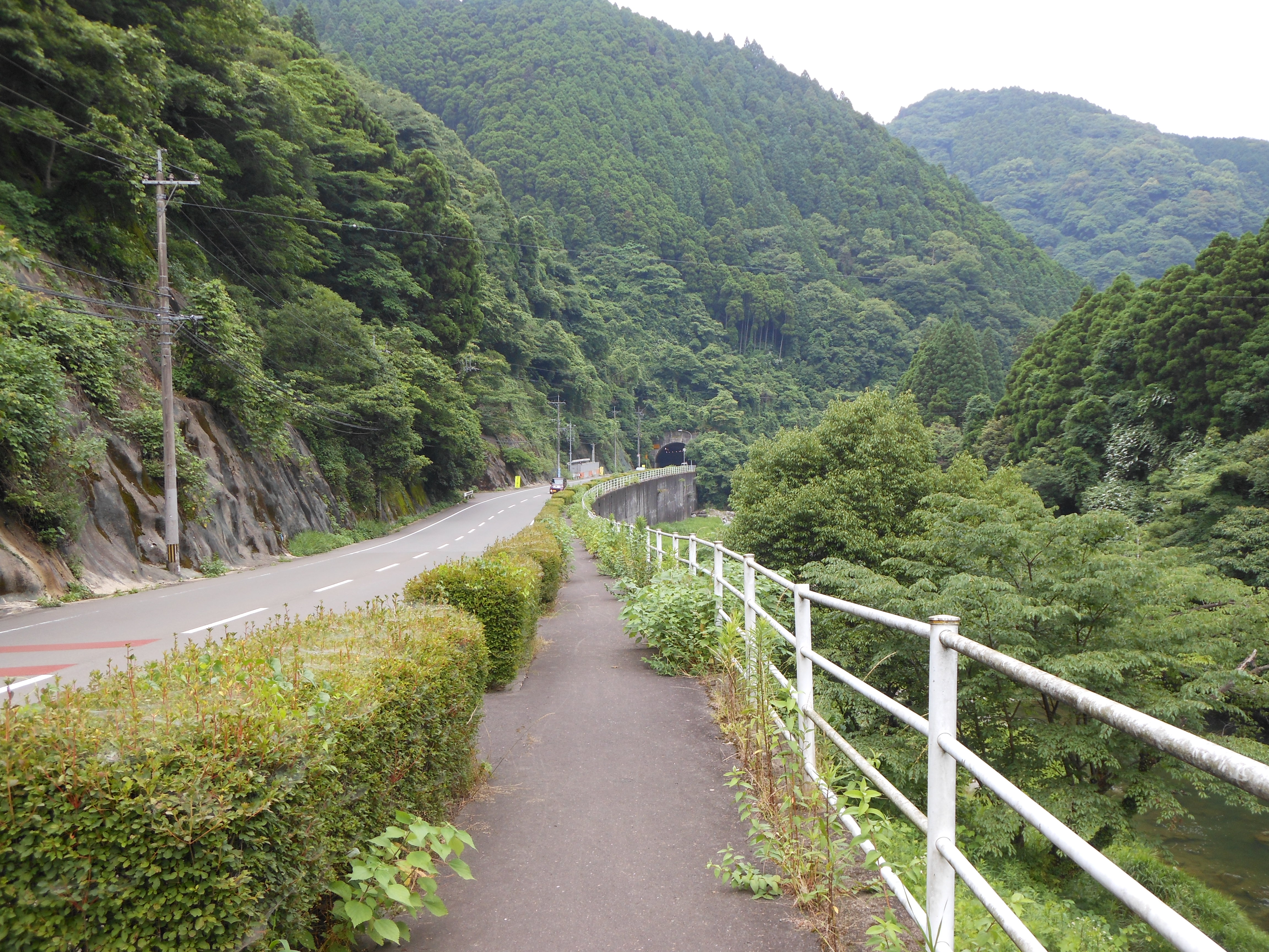 佐賀市富士町大字小副川の国道323号。奥は雄渕トンネル。右は嘉瀬川。